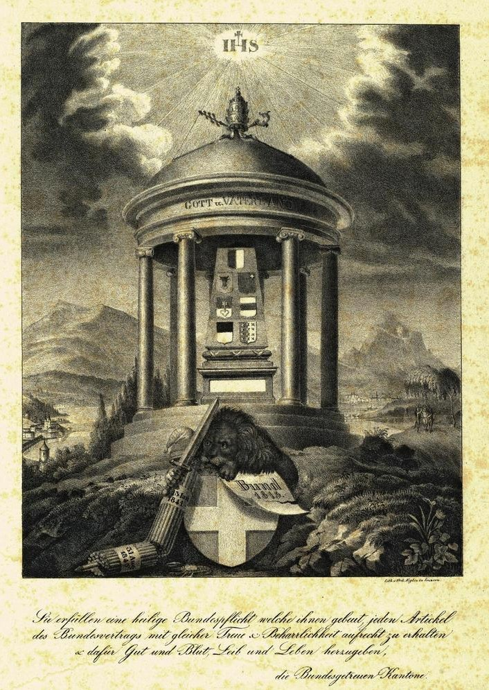 Propagandablatt für den Sonderbund in der Schweiz, 1845.